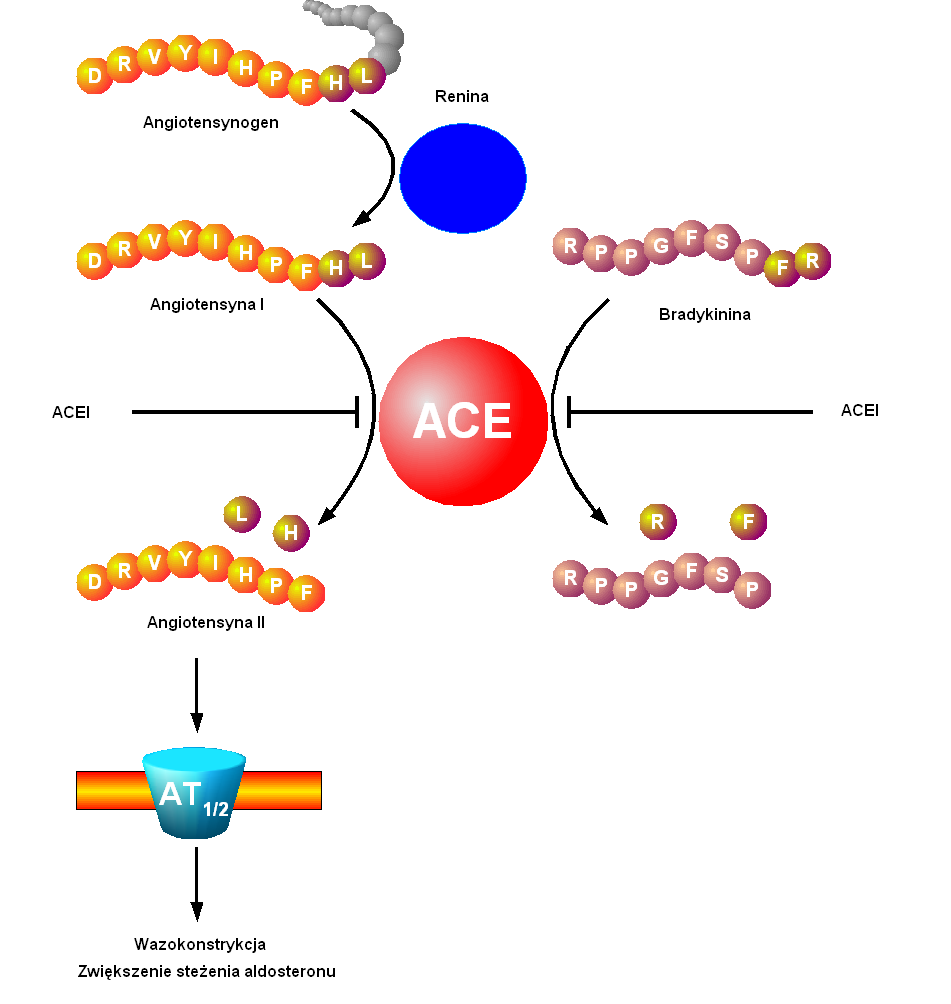 Angiffspunkt der ACE-Hemmer. Erstellt von: Sven Jähnichen. Erstellt am: 01.11.2004. Lizenz: GNU-FDL.